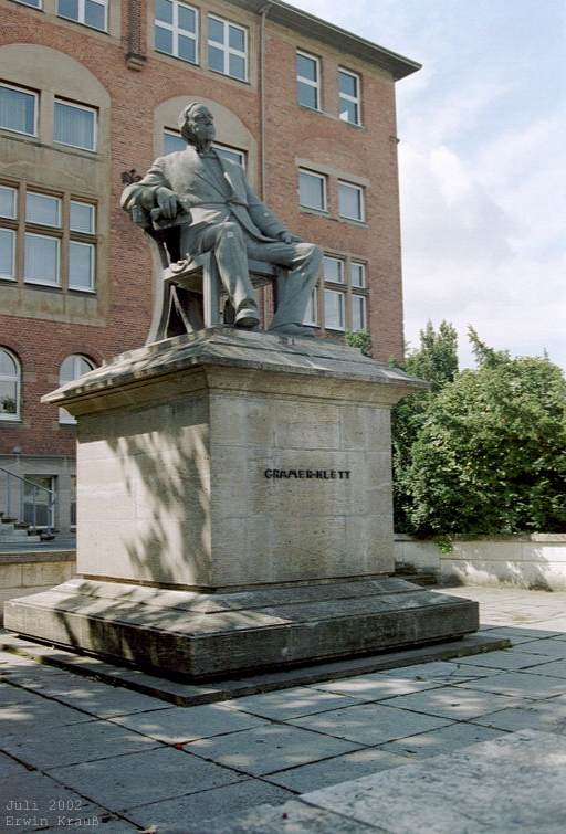 Denkmal Cramer-Klett, Nürnberg, Frankenstraße 150